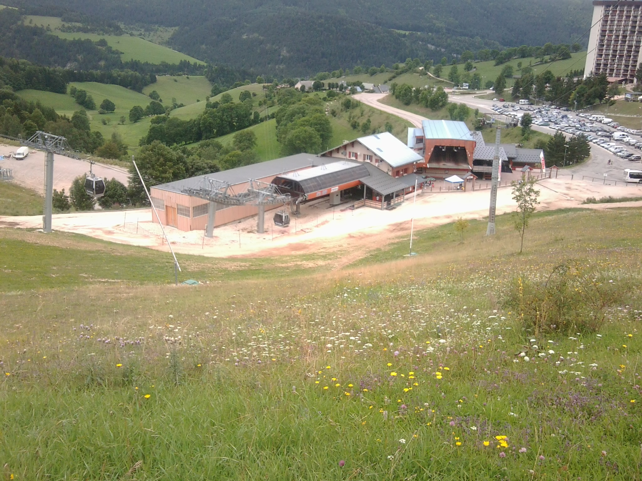 Espace Villard-Corrençon (38) : Les télécabines Côte 2000 (gauche) et Pré des Preys (droite), au Balcon de Villard.